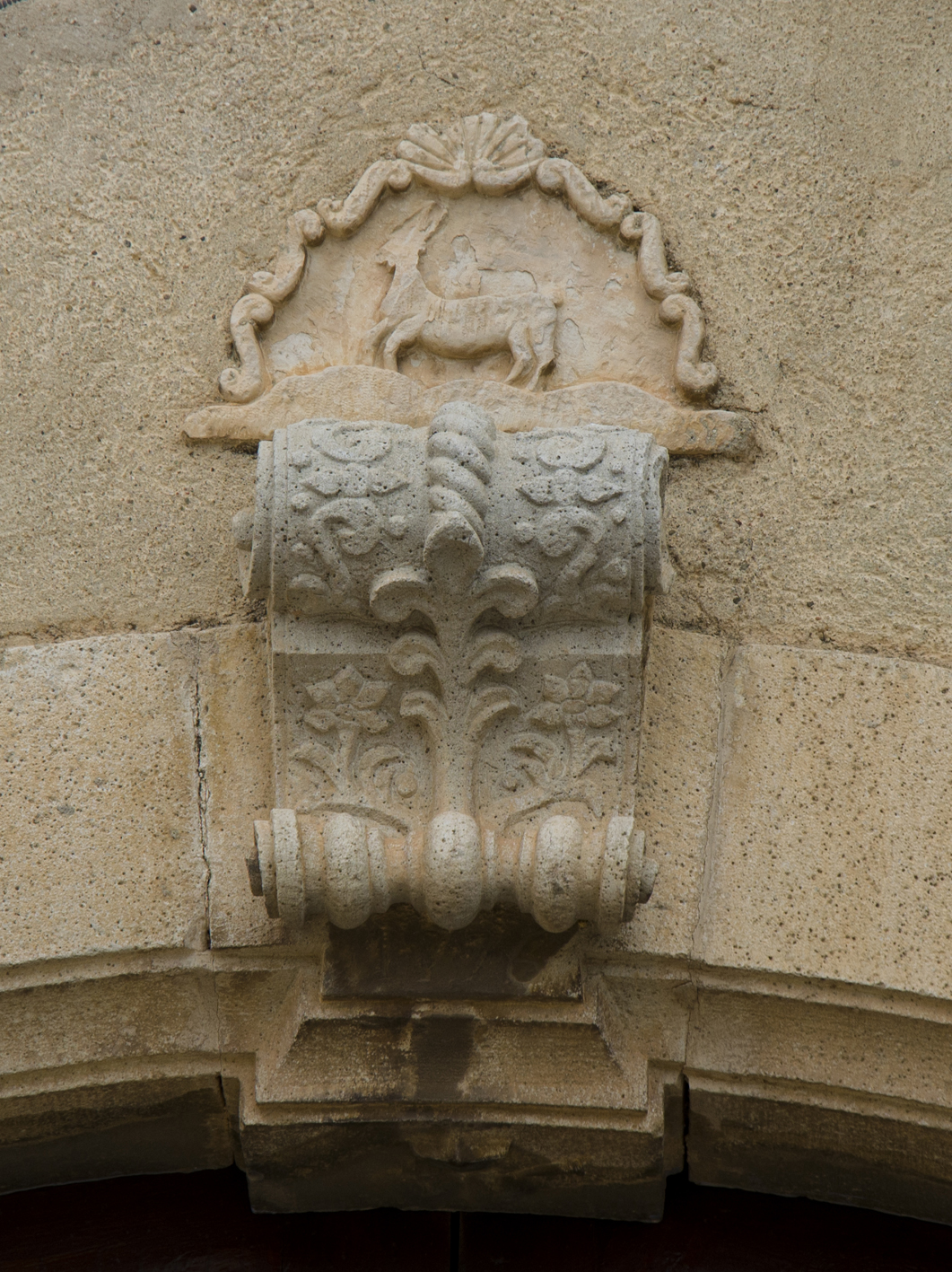 Barberà de la Conca